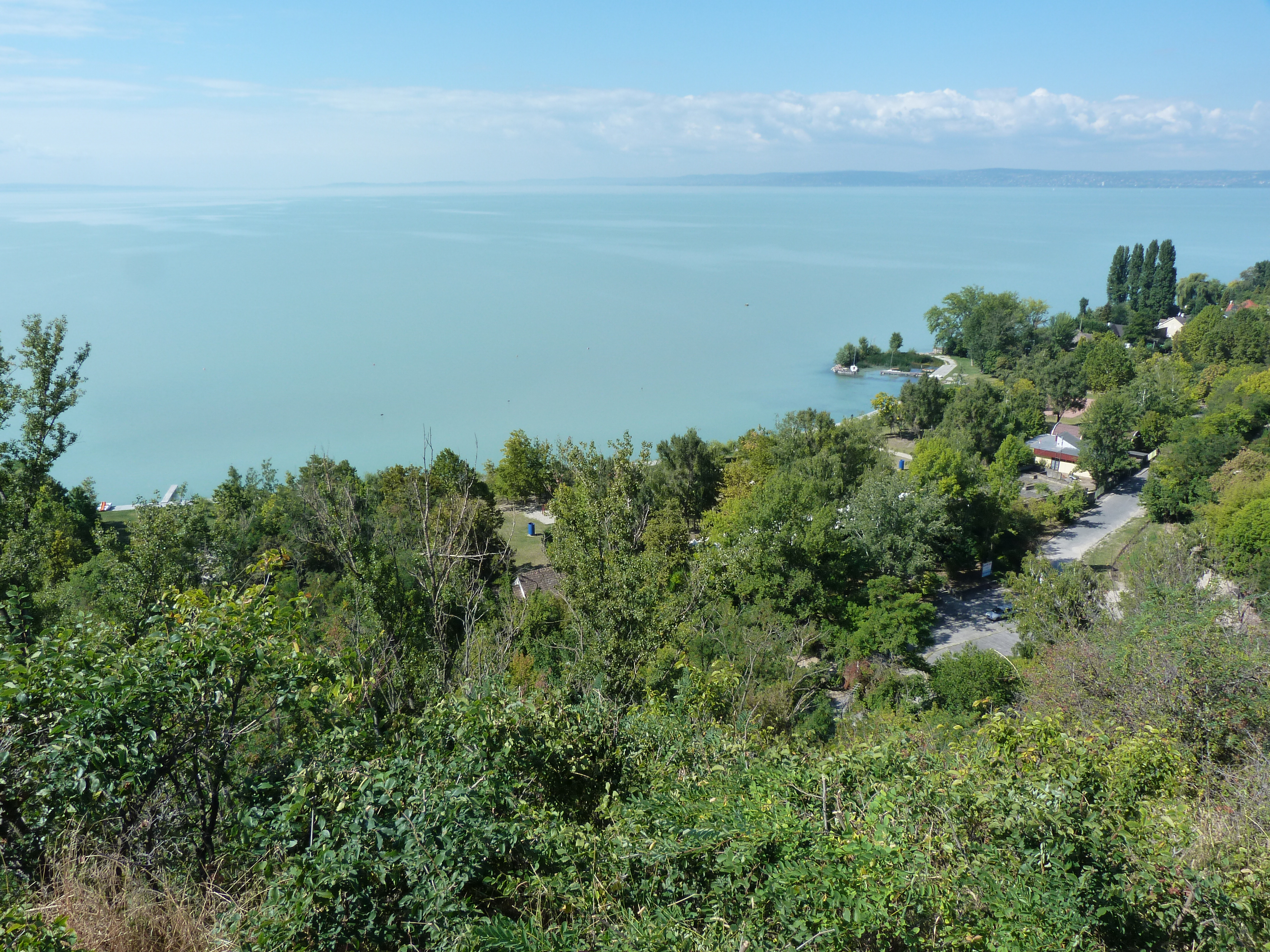 A felvétel 2013. szeptember 5 -én készült Balatonakarattyán. Bercsényi strand. ©© Derzsi Elekes Andor, Budapest, 2013, You are authorised to use these photos and vids under Creative Commons – even for commercial, for profit purposes. Photos must be attributed to Derzsi Elekes Andor. All of the photos and vids in the Metapolisz DVD line are under Creative Commons and can be used even for commercial – for profit – purposes. Recommended Citation Derzsi Elekes Andor: Metapolisz DVD line